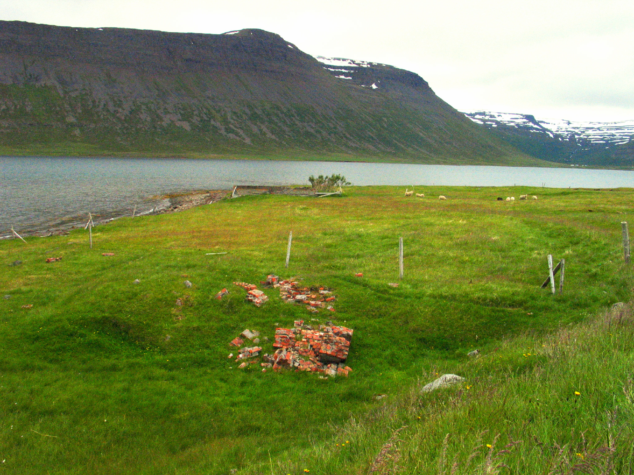 Í forgrunni sést leifar stromps sem tilheyrðy bræðslu hvalveiðimanna á Dvergasteinseyri. Horf í Suðaustur.